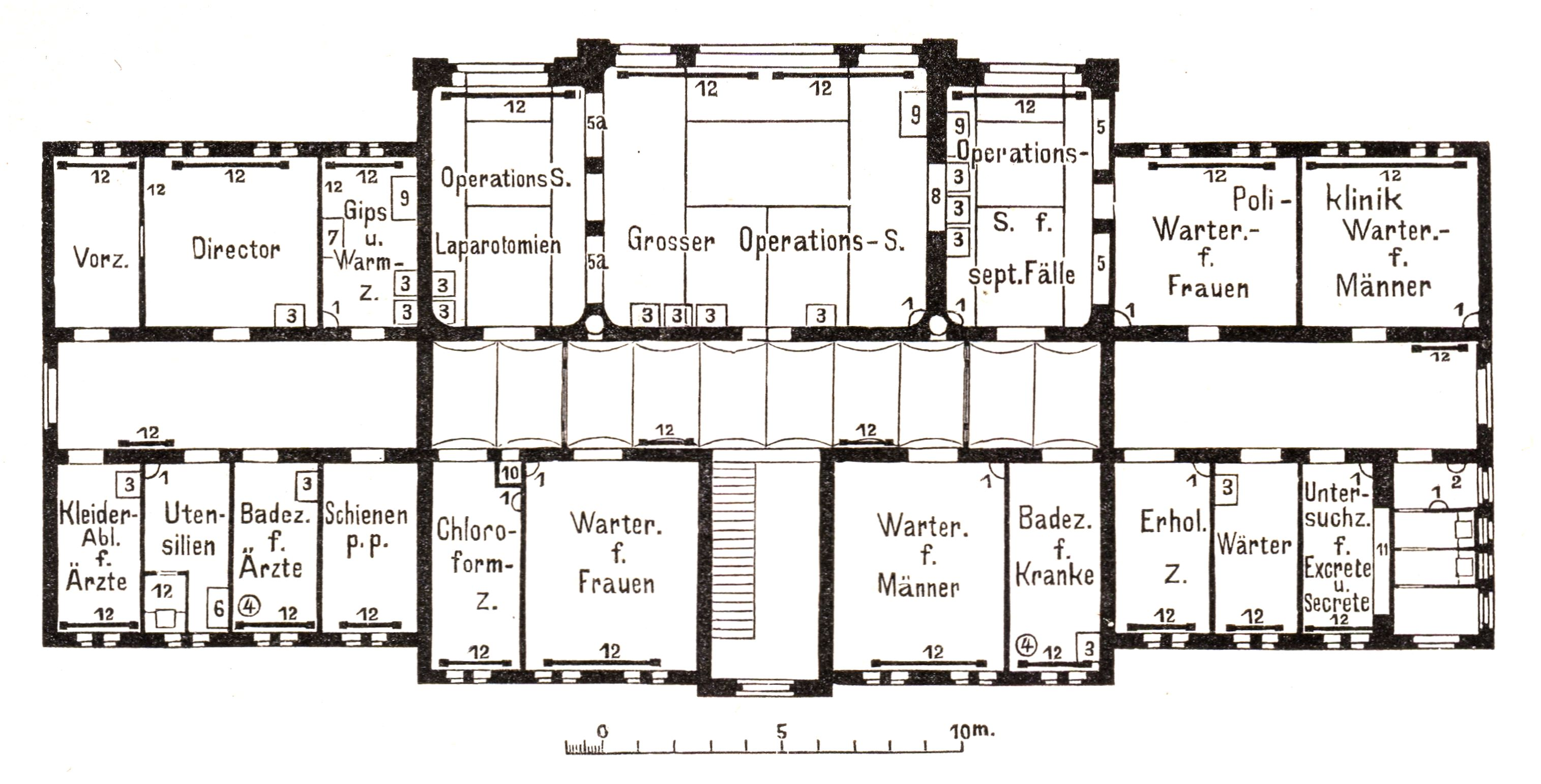 Berlin - Krankenhaus Moabit, Grundriss Operationshaus